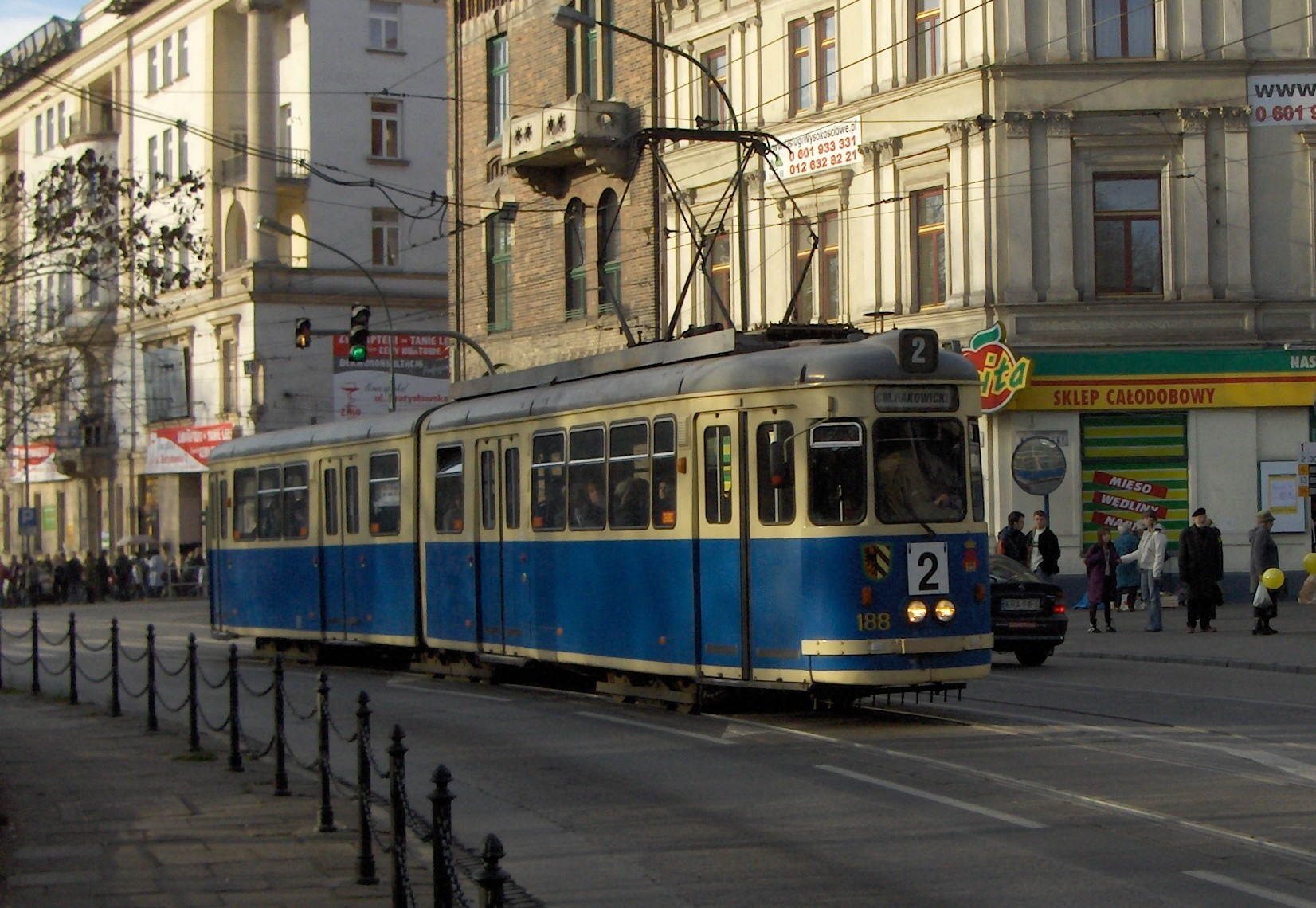 Wagon tramwajowy typu Man GT-6 nr 188 należący do MPK Kraków . Ulica Basztowa.